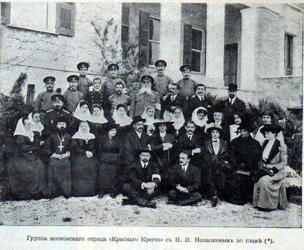 Московский отряд Красного Креста под руководством Н. И. Напалкова на Балканской войне, 1913 год